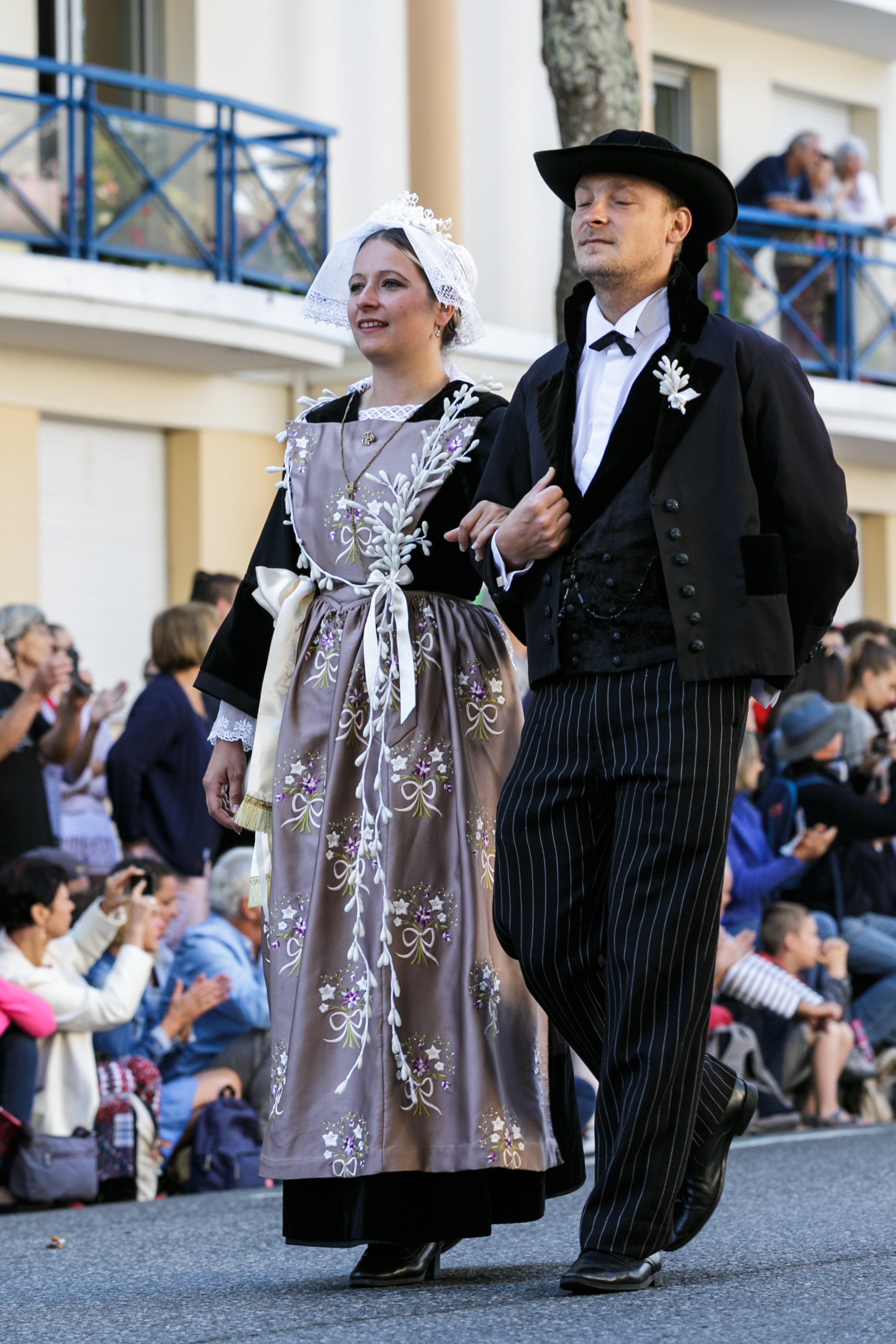 Festival Interceltique de Lorient 2017 - Grande parade des nations celtes - Lauriane Martinet, reine d'Arvor 2016 (Vannes)